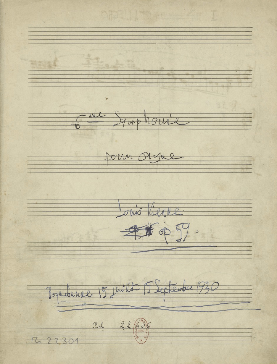 Page de garde de la Sixième Symphonie pour orgue de Louis Vierne composée en 1930. Manuscrit conservé à la BNF (